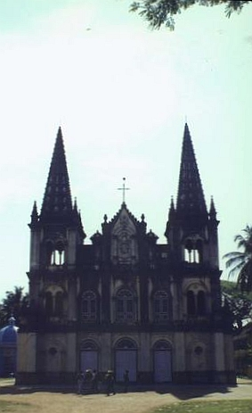 Church in Kochi, India